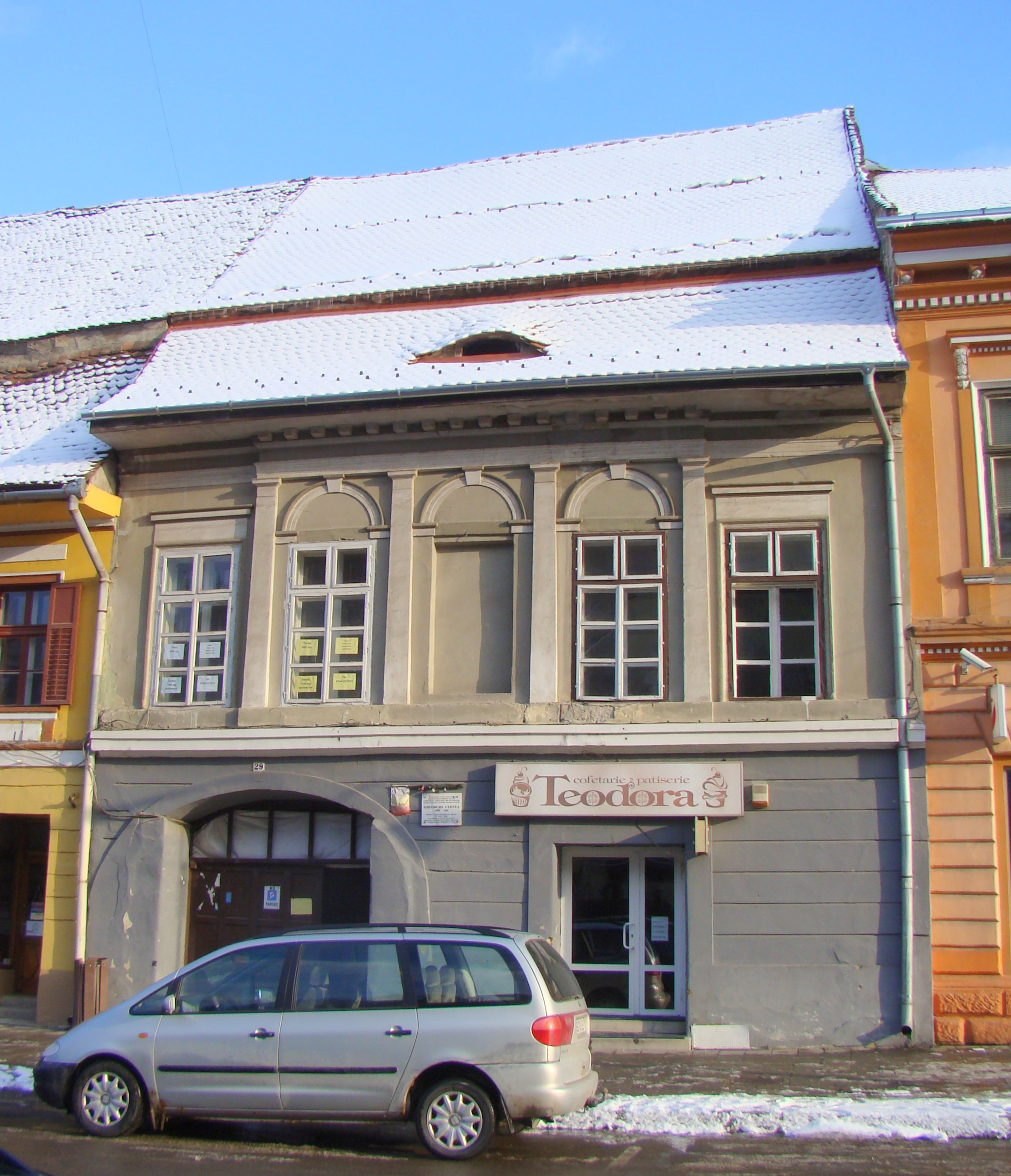 Casă, municipiul Sighișoara, Piața Oberth Hermann 29 sec. XVII, 1720, 1875 - 1900